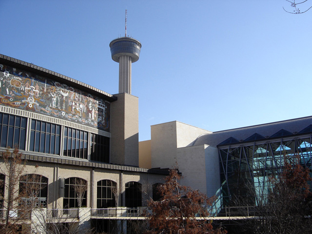 Henry B. Gonzalez Convention Center, San Antonio, Texas.